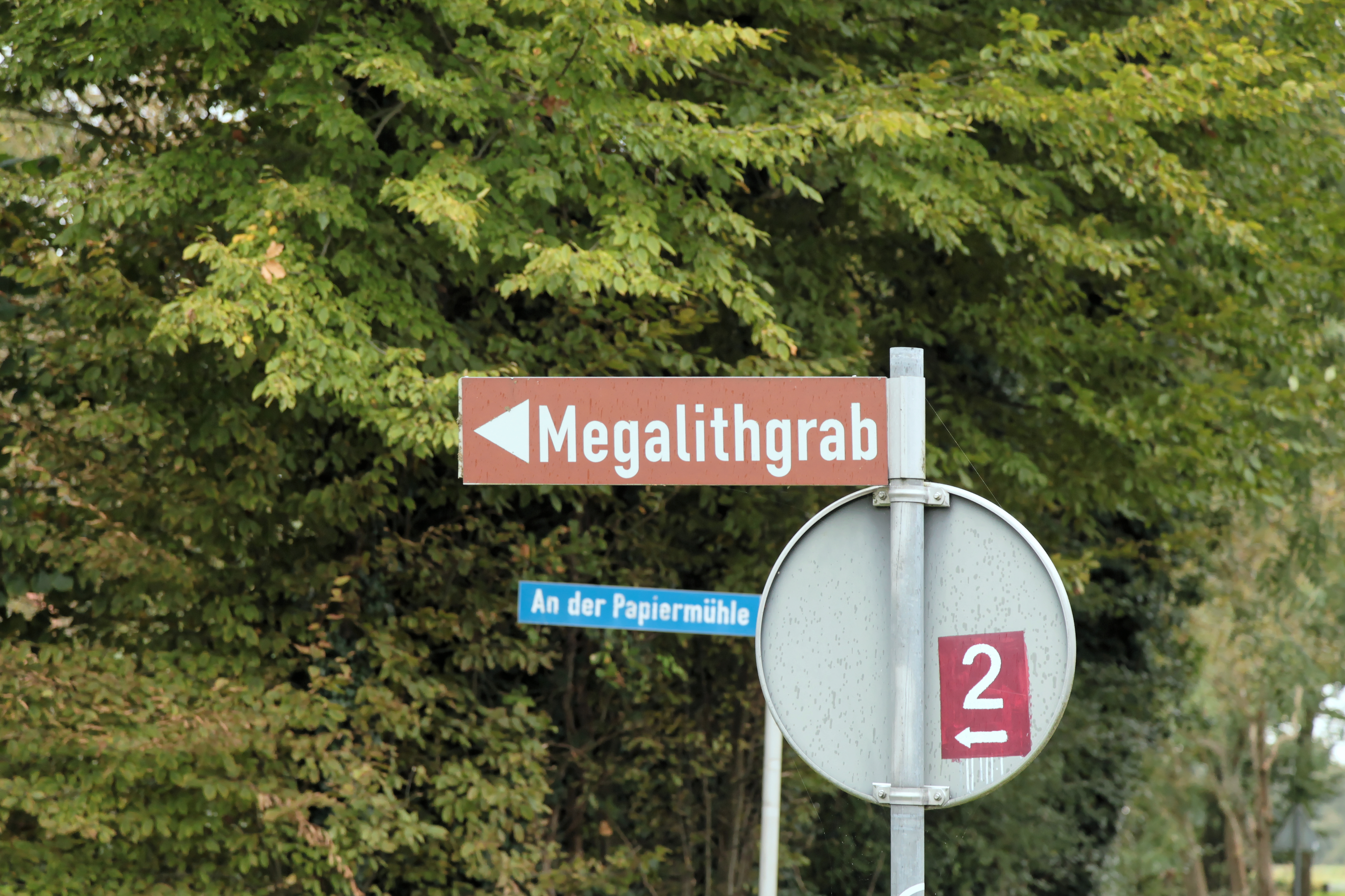 Großsteingrab Lengerich-Wechte I, Brochterbecker Straße in Lengerich